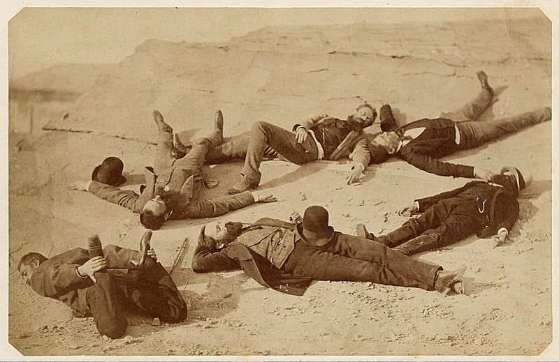 Gruppenbild von links nach rechts: Carl Rudolf Huber, Franz von Lenbach, Hans Makart, Adolf Gnauth, Leopold Carl Müller und Georg Ebers auf ihrer Ägyptenreise 1875-1876